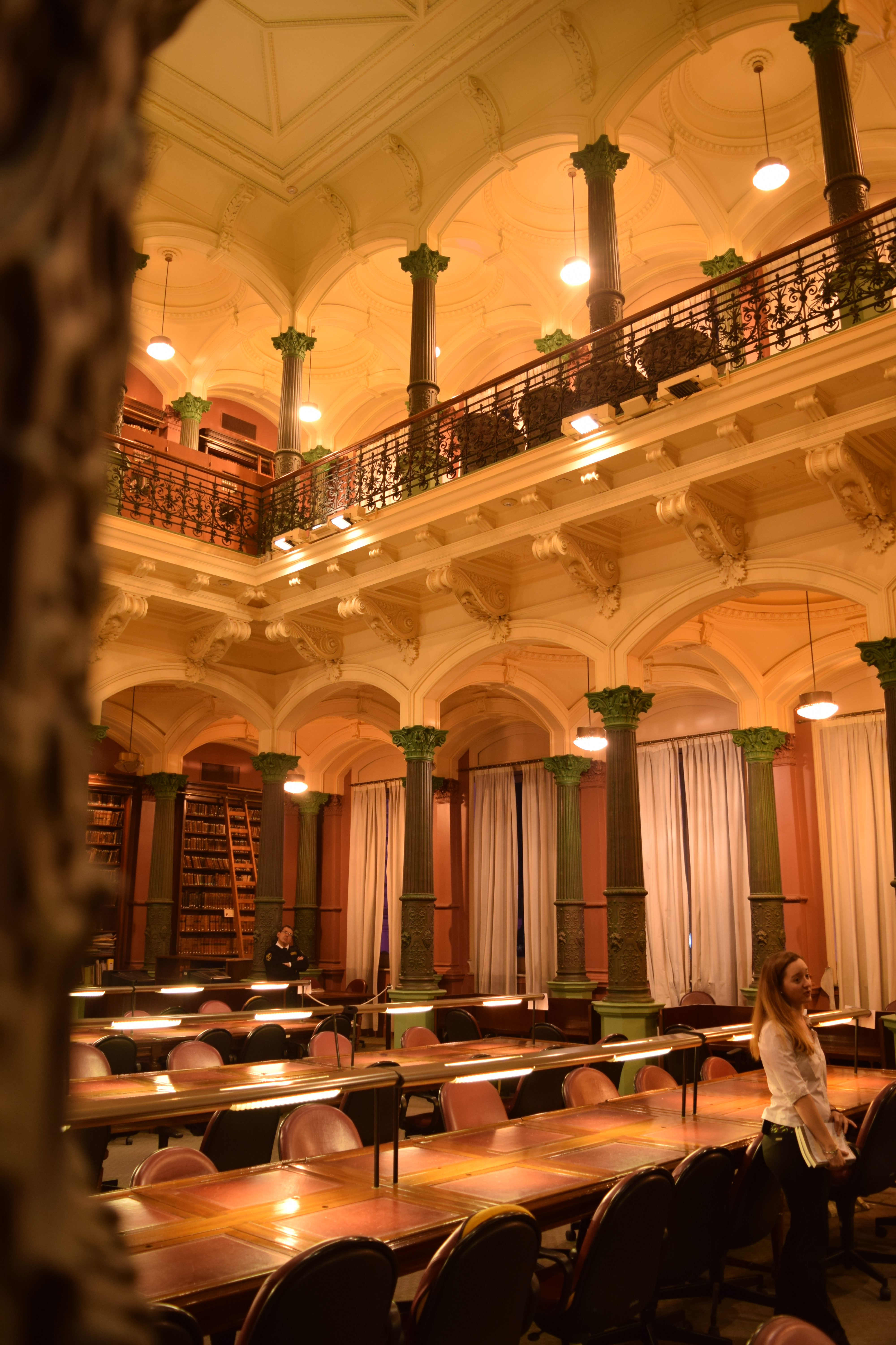 Biblioteca Nacional de Maestros dentro del Palacio Pizzurno durante la Noche de los Museos 2015.